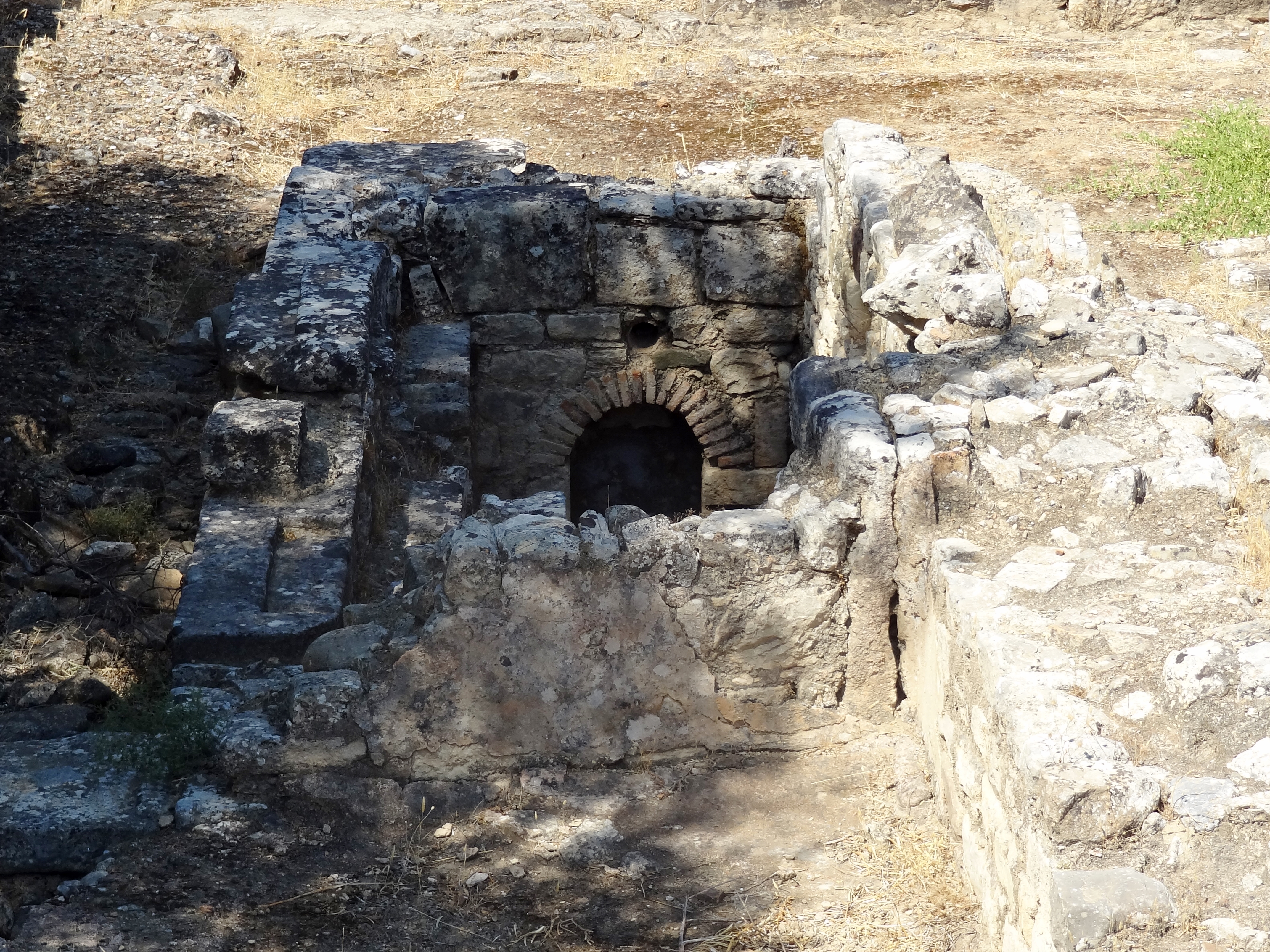 Reste der griechisch-römischen Stadt Gortyn (Γορτύν), Gemeinde Gortyna, Regionalbezirk Iraklio, Kreta, Griechenland